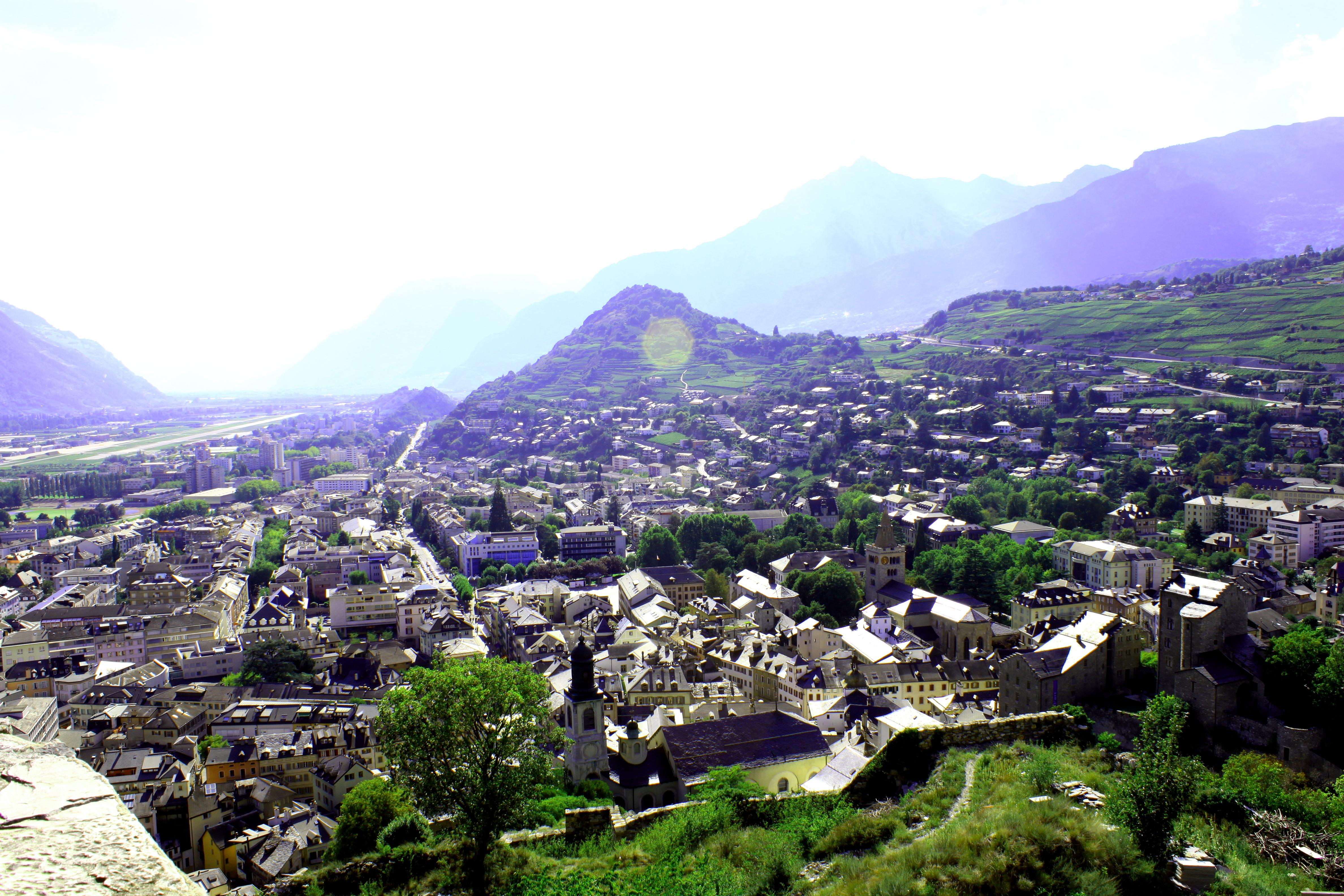 Sion, la ville, vue depuis Valère.